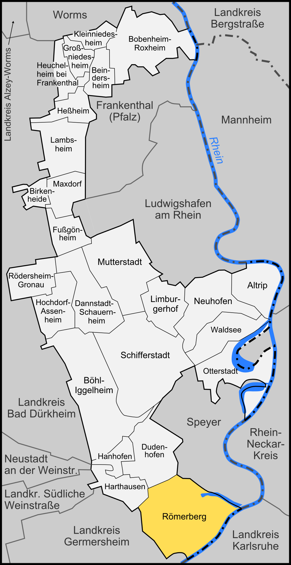 Karte der Gemeinde Römerberg im Rhein-Pfalz-Kreis